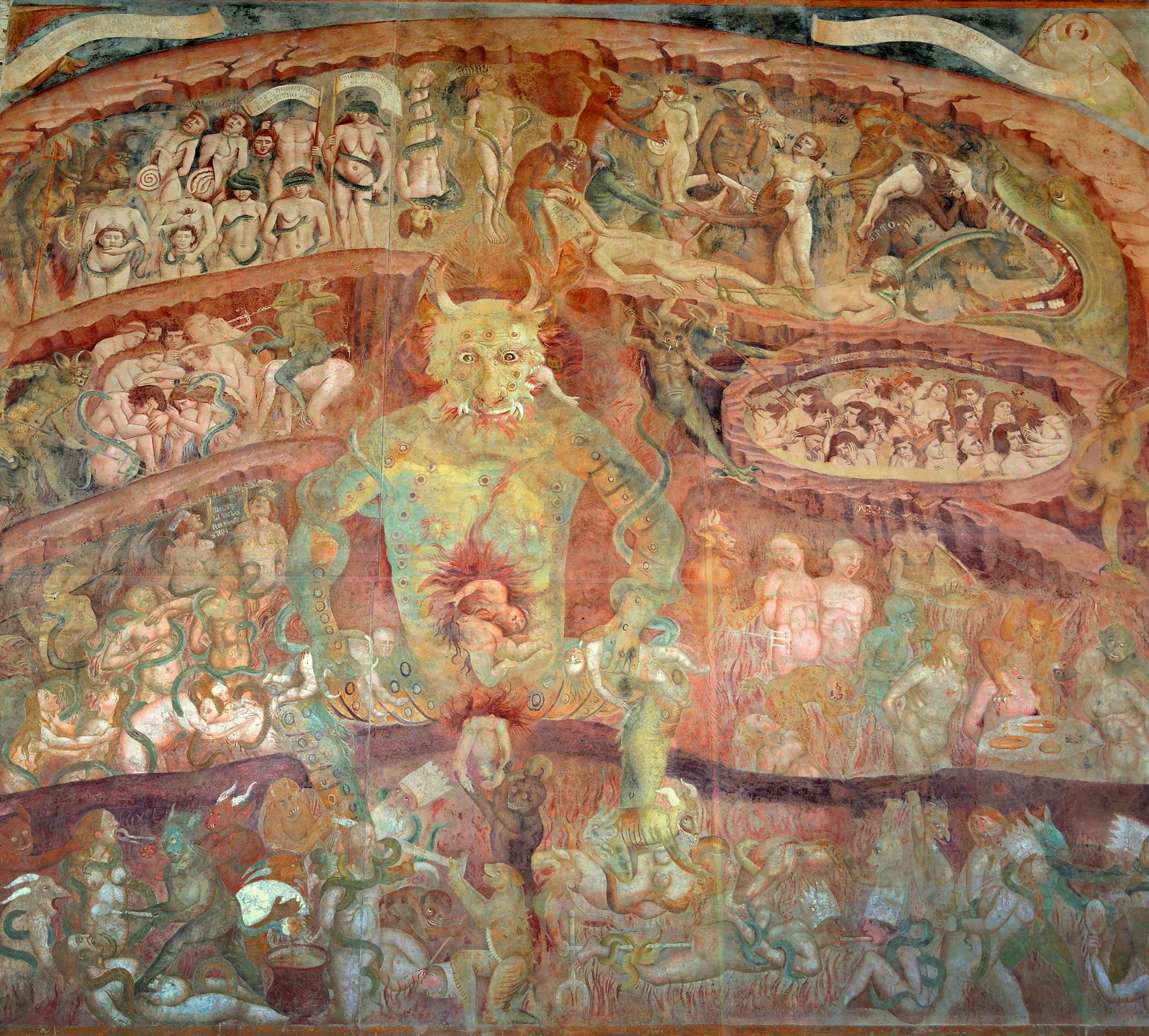 L' "Inferno" ad opera di Buffalmacco, conservato nel Camposanto monumentale di Pisa